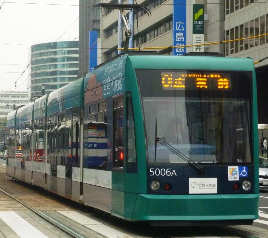 宮島水族館部分ラッピング電車 行先表示器がLED化された